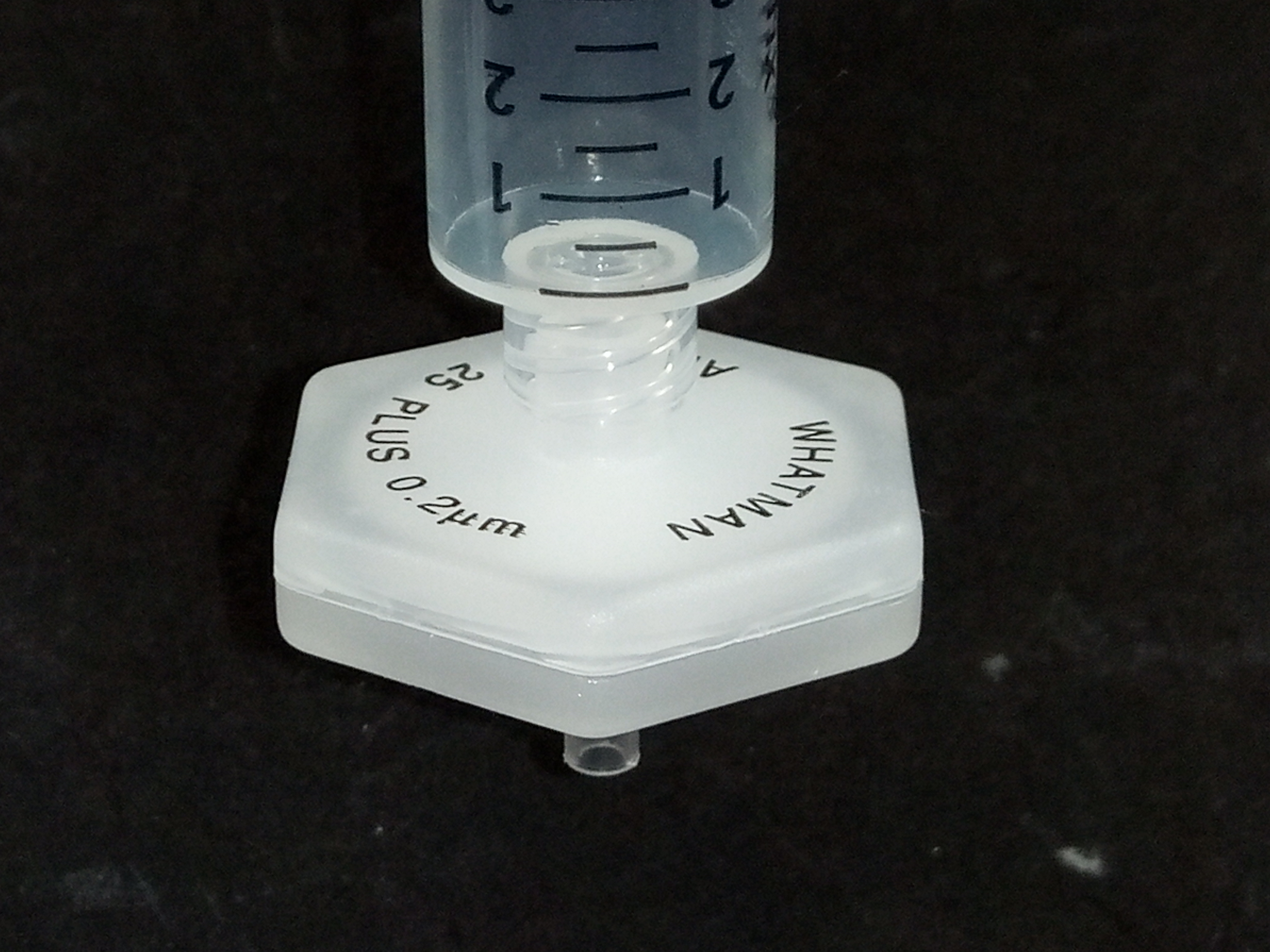 Spritzenfilter 0,2µm mit Einwegspritze